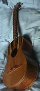 Cuatro aus Venezuela